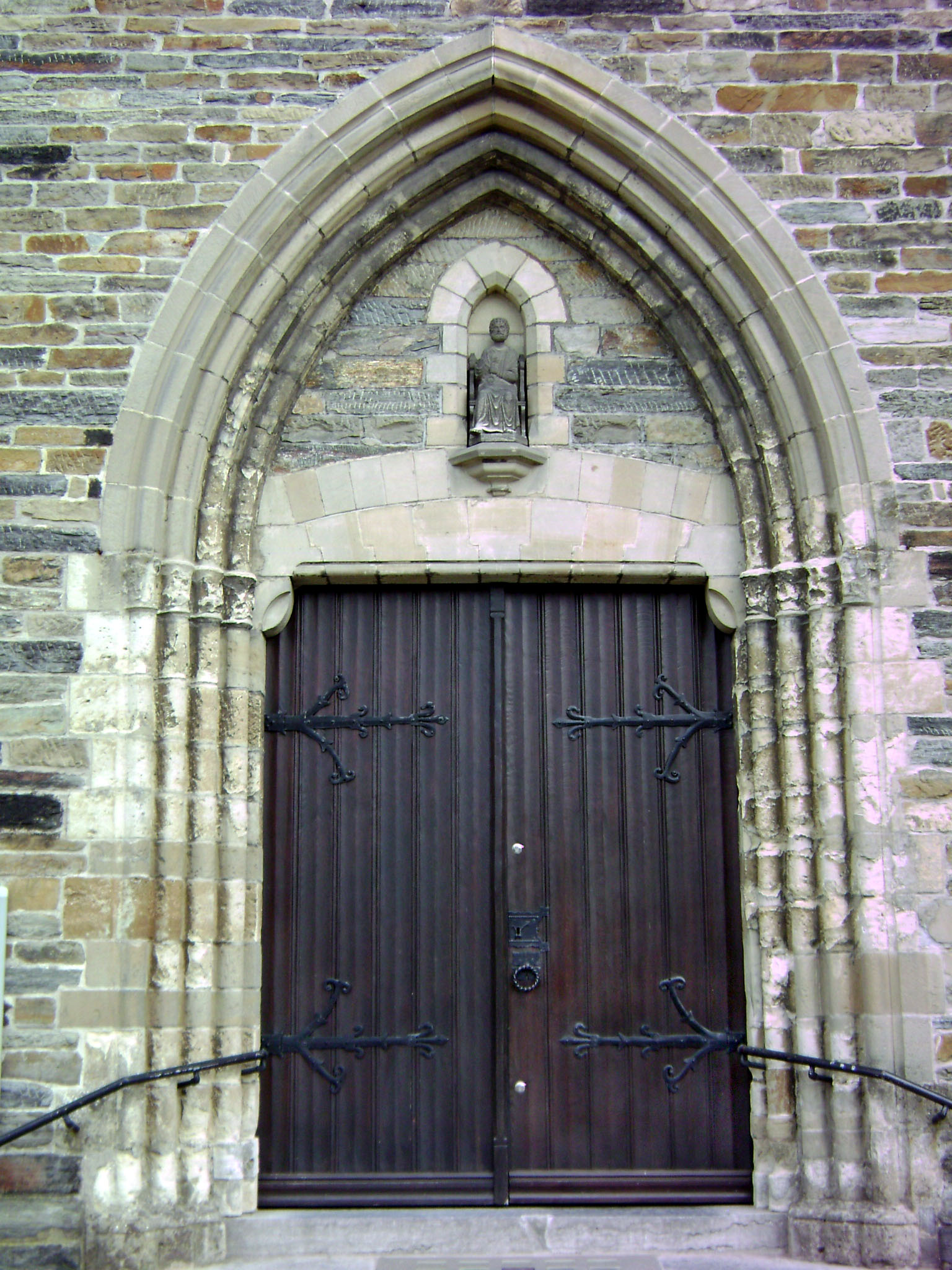 Hoofdingang van de Sint-Pieters-en-Pauluskerk in Herne